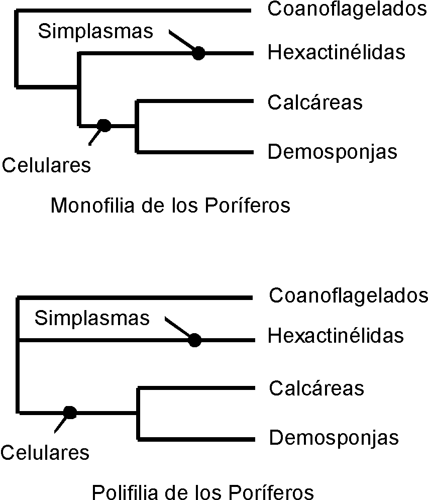 Cladogramas de Porifera